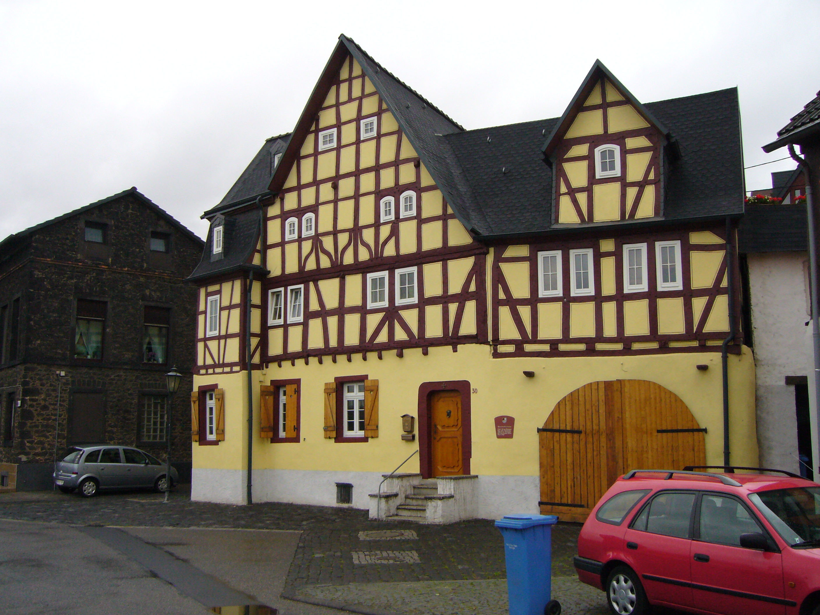 Das Rheinische Haus in Fahr. Feldkirchen-Fahr, Linzer Straße 30: Rheinisches Haus.